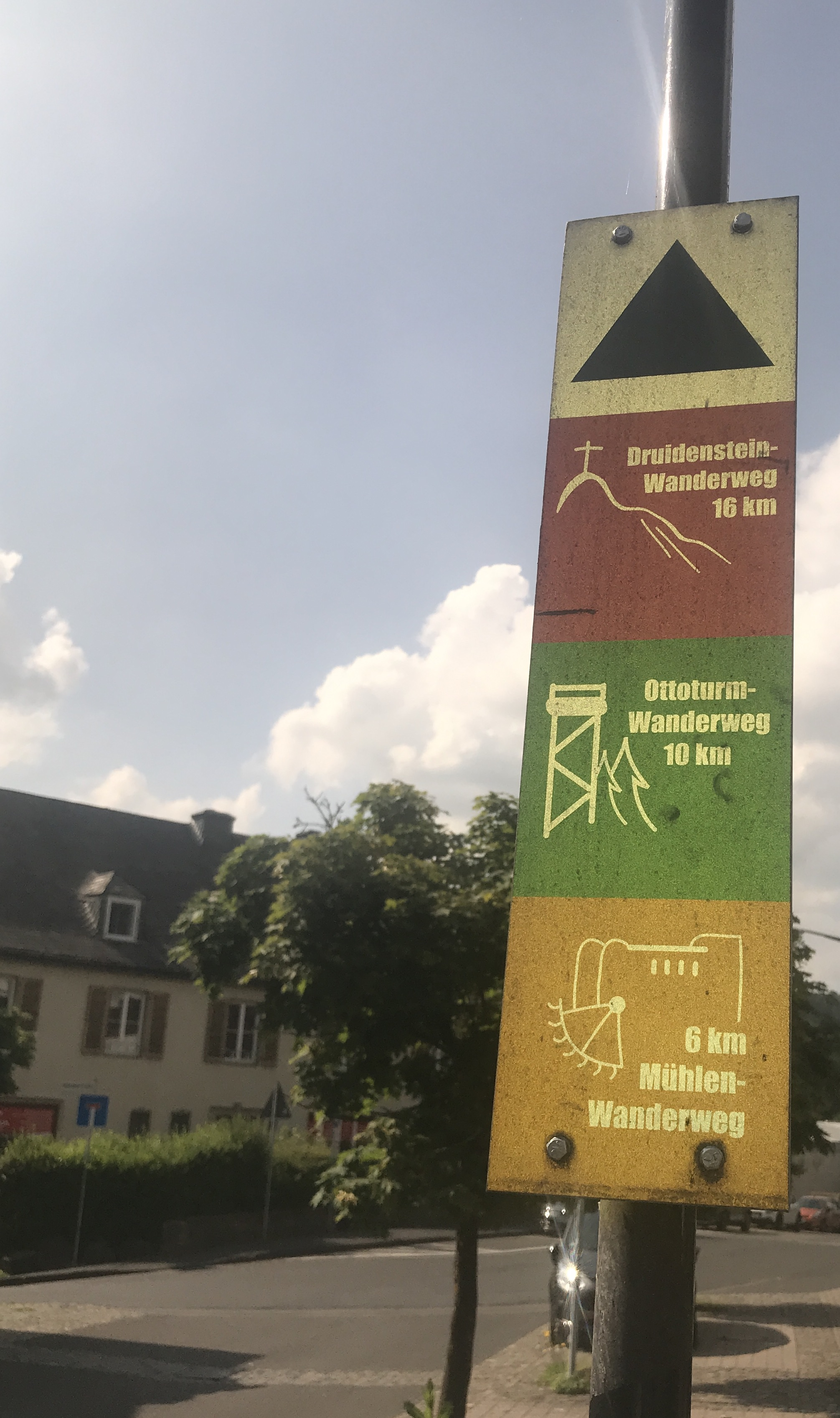 Kirchen Wanderbeschildung mit km-Angaben (zugeschnitten)